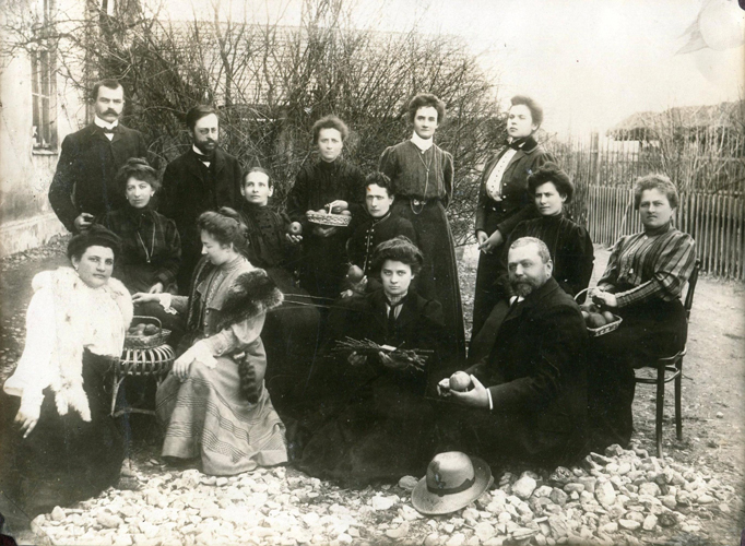 Uczestnicy jednego z kursów ogrodniczych dla nauczycieli. Fotografia z Kroniki Szkoły (oryginał wraz z Kroniką przechowywany w Izbie Pamięci Gimnazjum nr 7 w Krakowie, wersja elektroniczna wraz z innymi zbiorami na stronie (w dziale Fotografie).